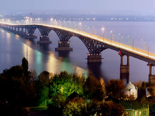 Мост, соединяющий два города России - Саратов и Энгельс. (The bridge between two Russian Cities - Saratov & Engels)